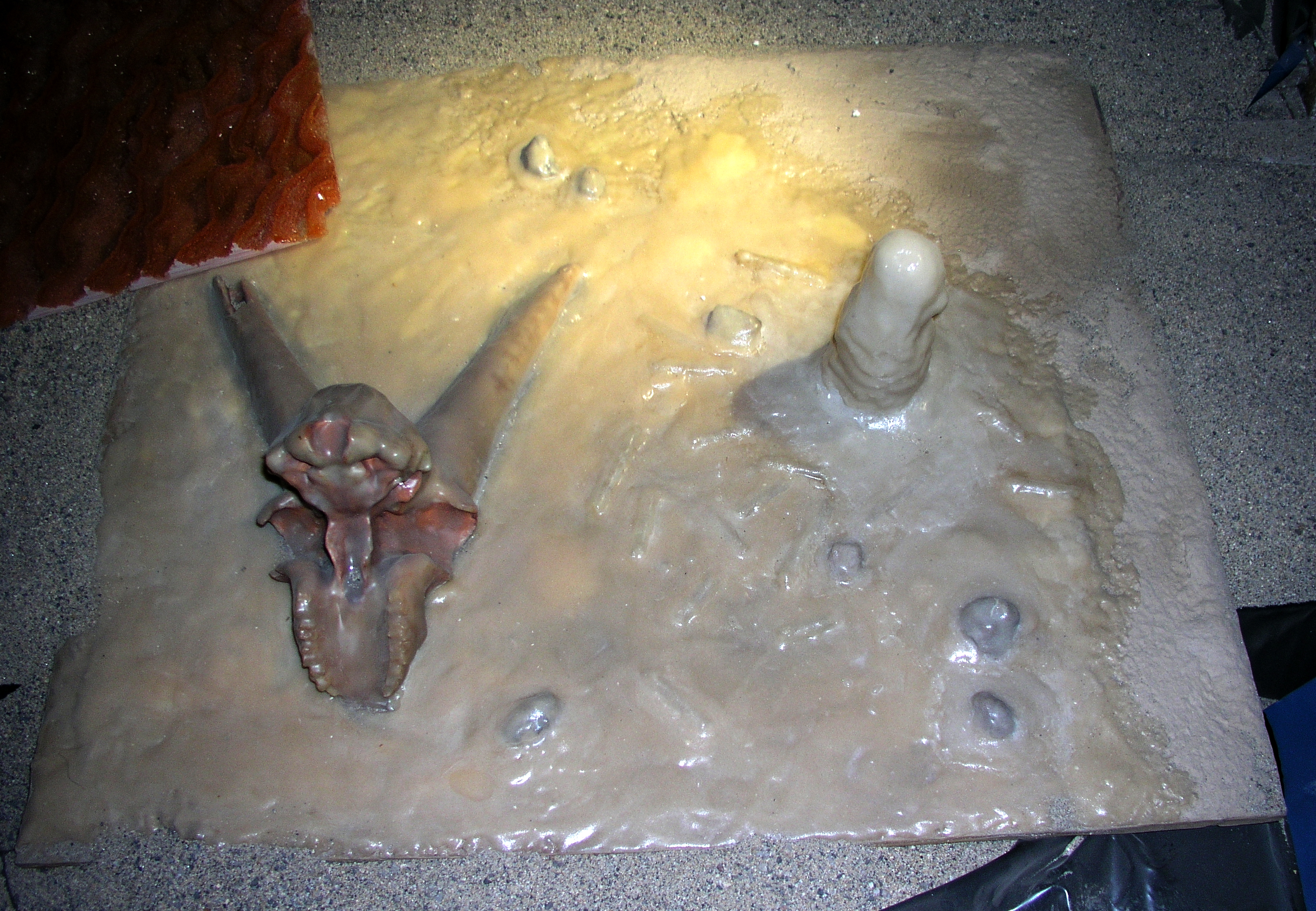 Caverne du Pont d'Arc